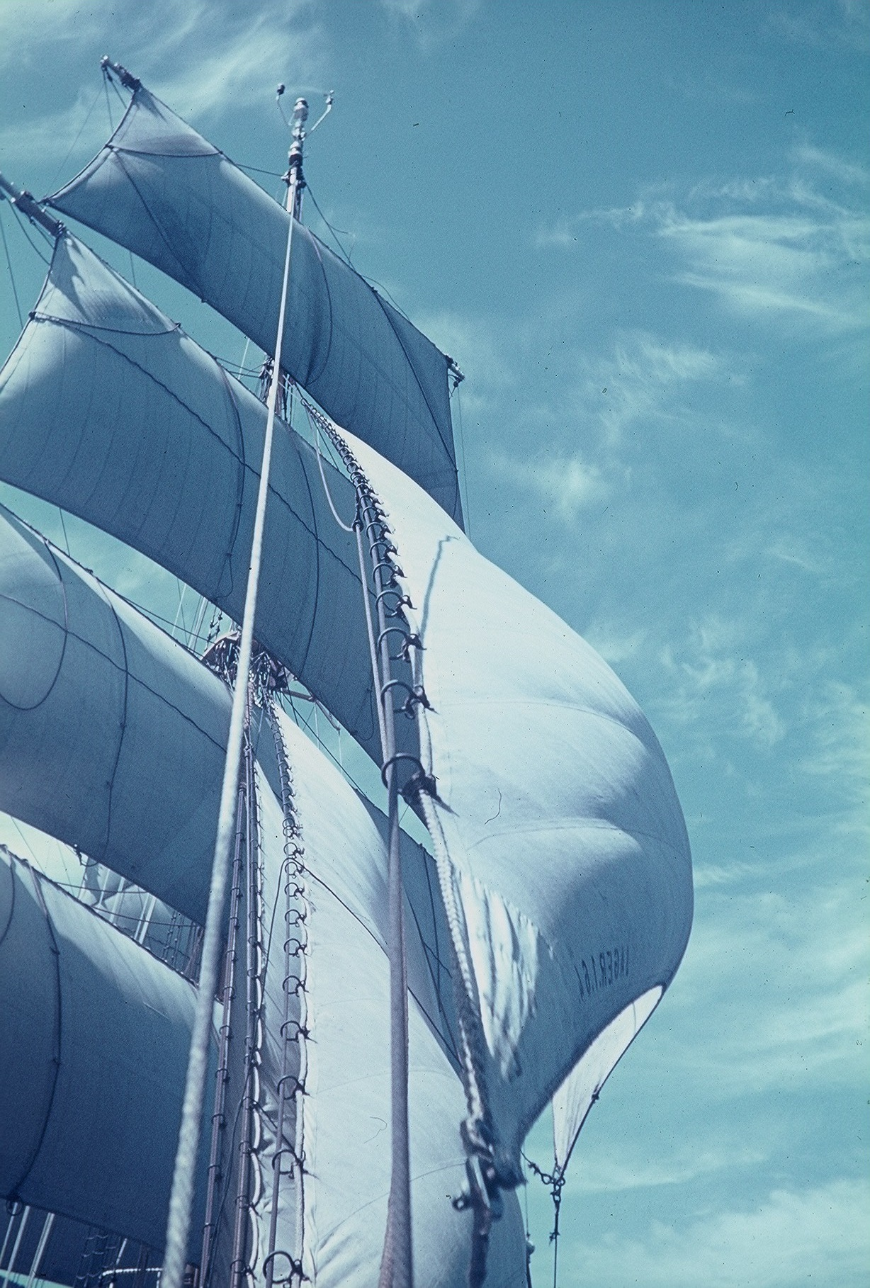 Drei von vier Vorsegeln und voll gesetzter Vortopp der Gorch Fock (1958) im Atlantik. Der Jager, das vorderste Vorsegel, ist nicht gesetzt. Sein unbesetztes, gerades Stag (links) und die drei besetzten, gebogenen Stagen illustrieren die enormen Zugkräfte auf die Stahlseile.